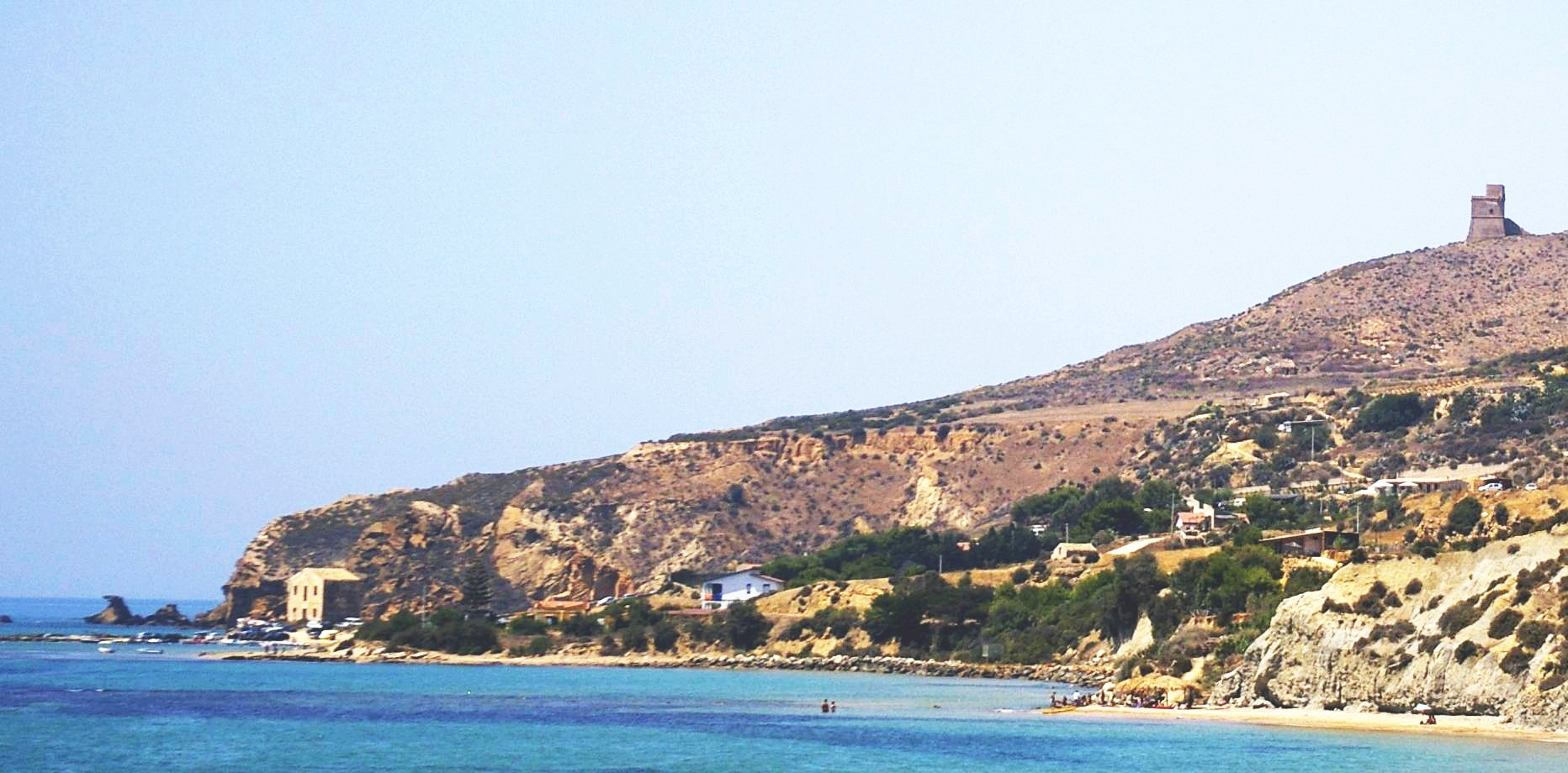 Torre di Monterosso (Realmonte - AG), XVI secolo